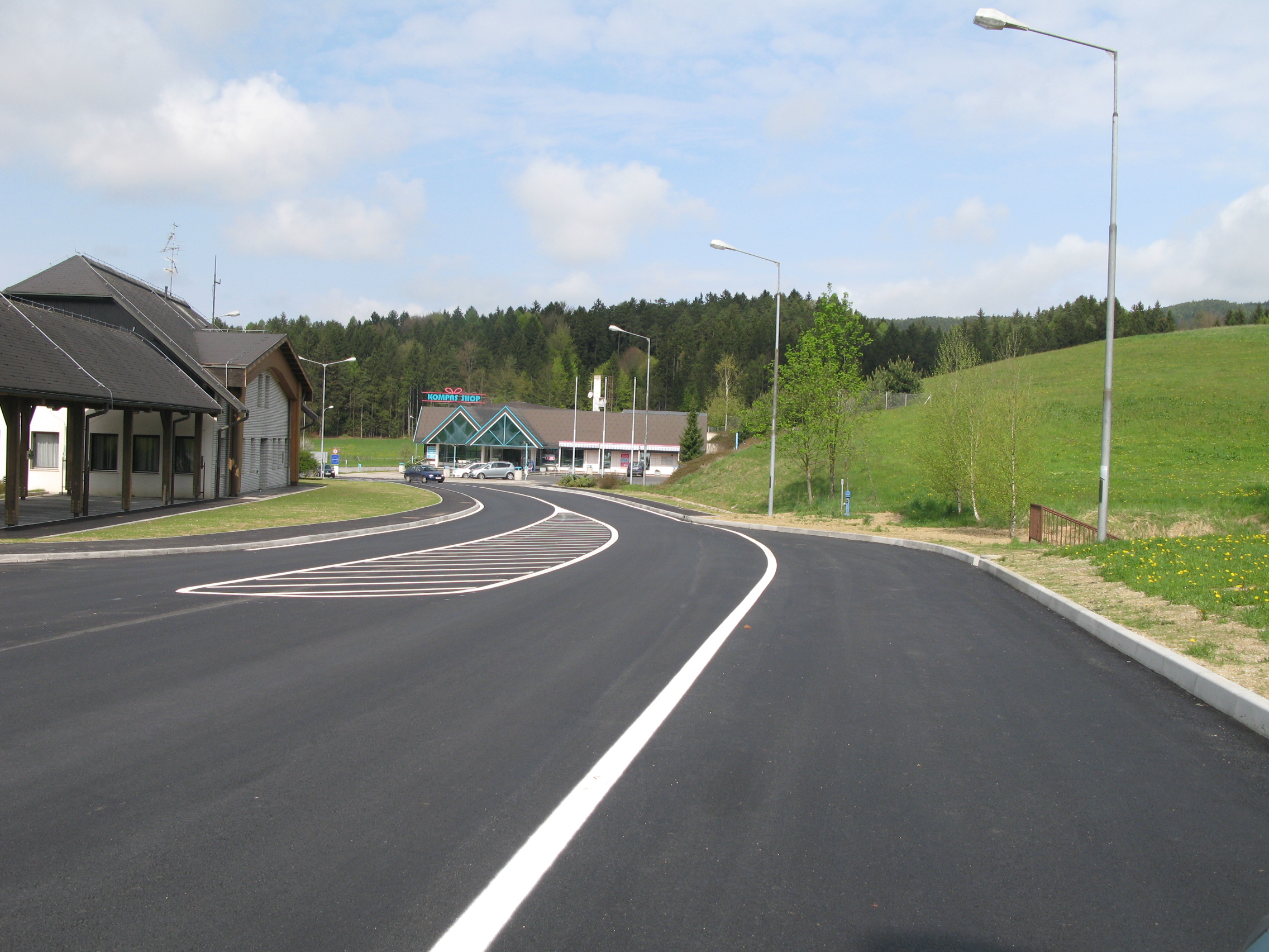 MMP Holmec po odstranitvi nadstrešnic